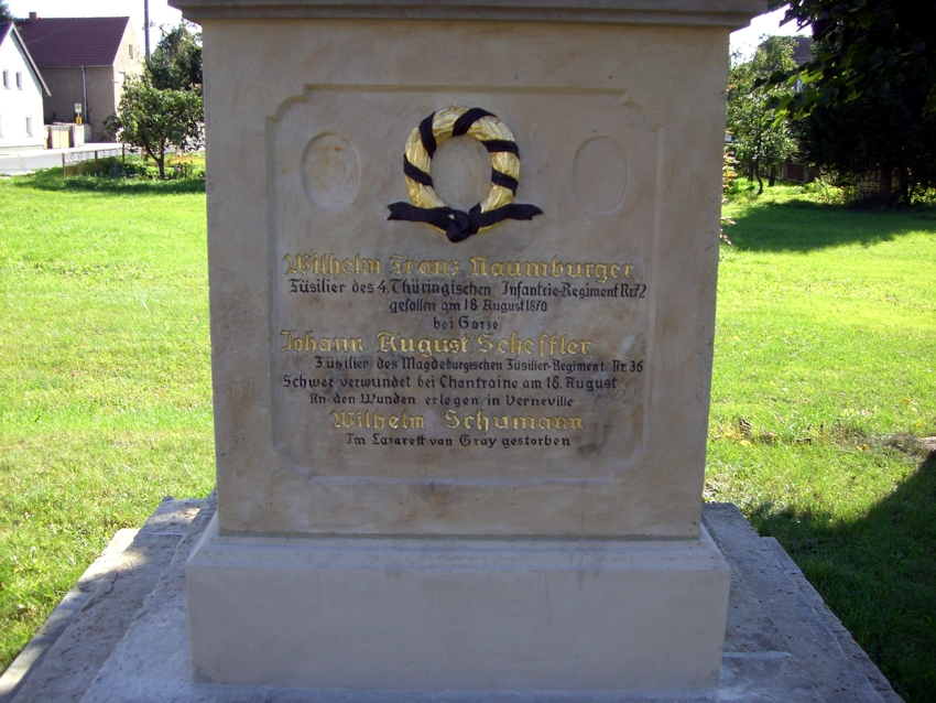 Stolzenhain, Denkmal für die Opfer des Deutsch-Französischen Krieges 1870/71